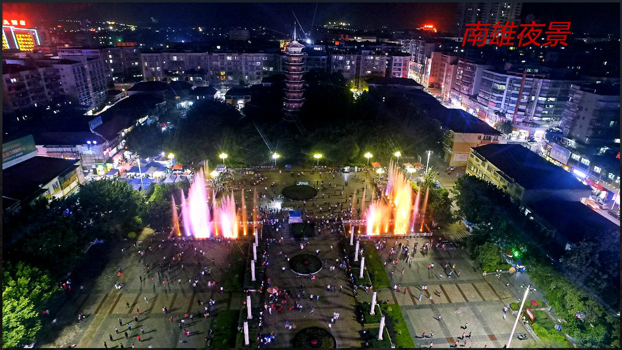 南雄市三影塔夜景